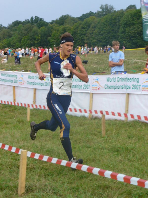 Annika Billstam, WOC2007, Kiev Ukrain, relay